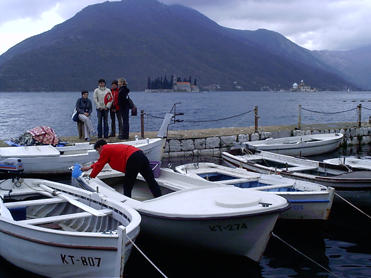 Perast, Montenegro088 Perast Patera